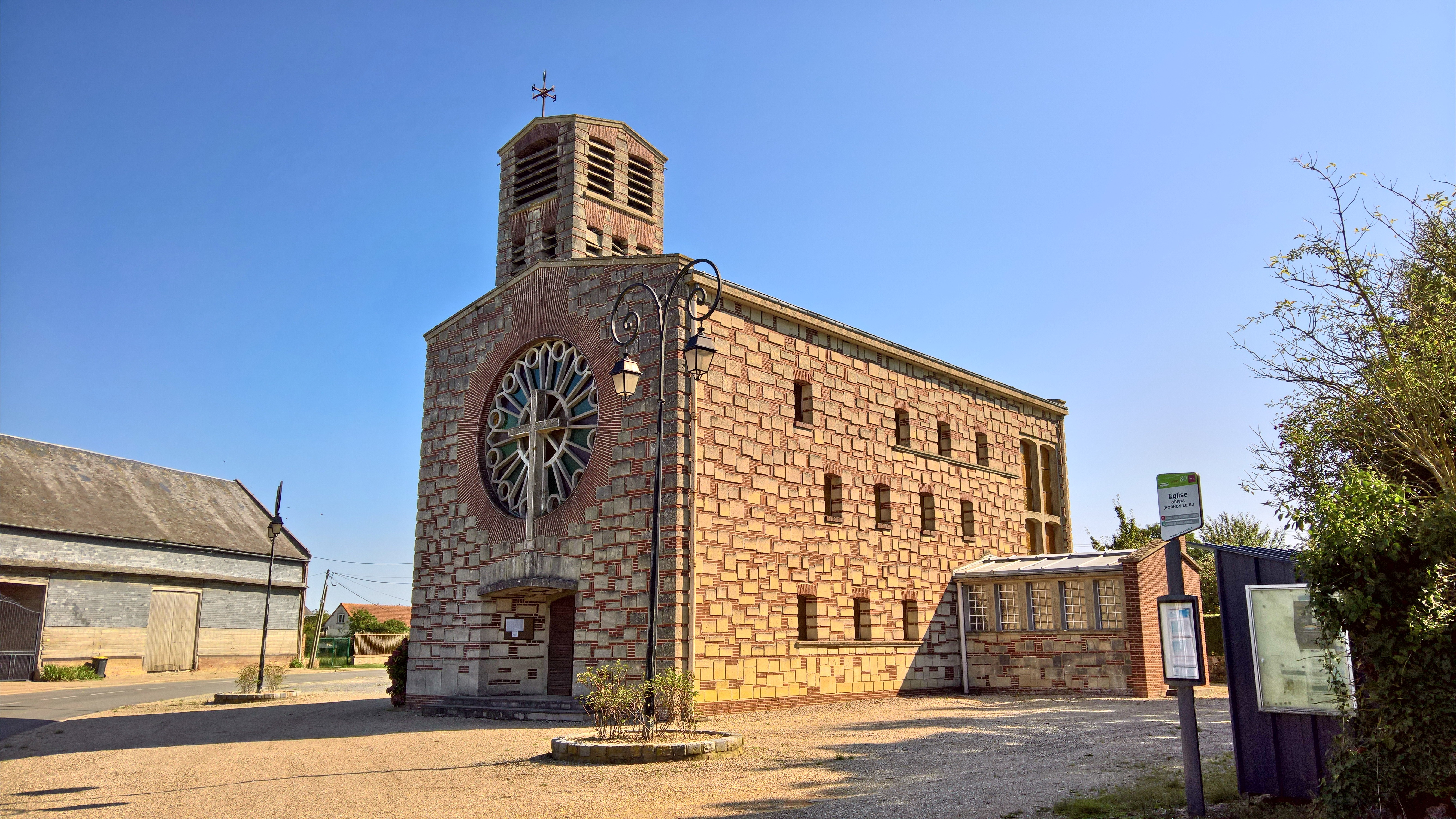 L'église d'Orival (Somme)